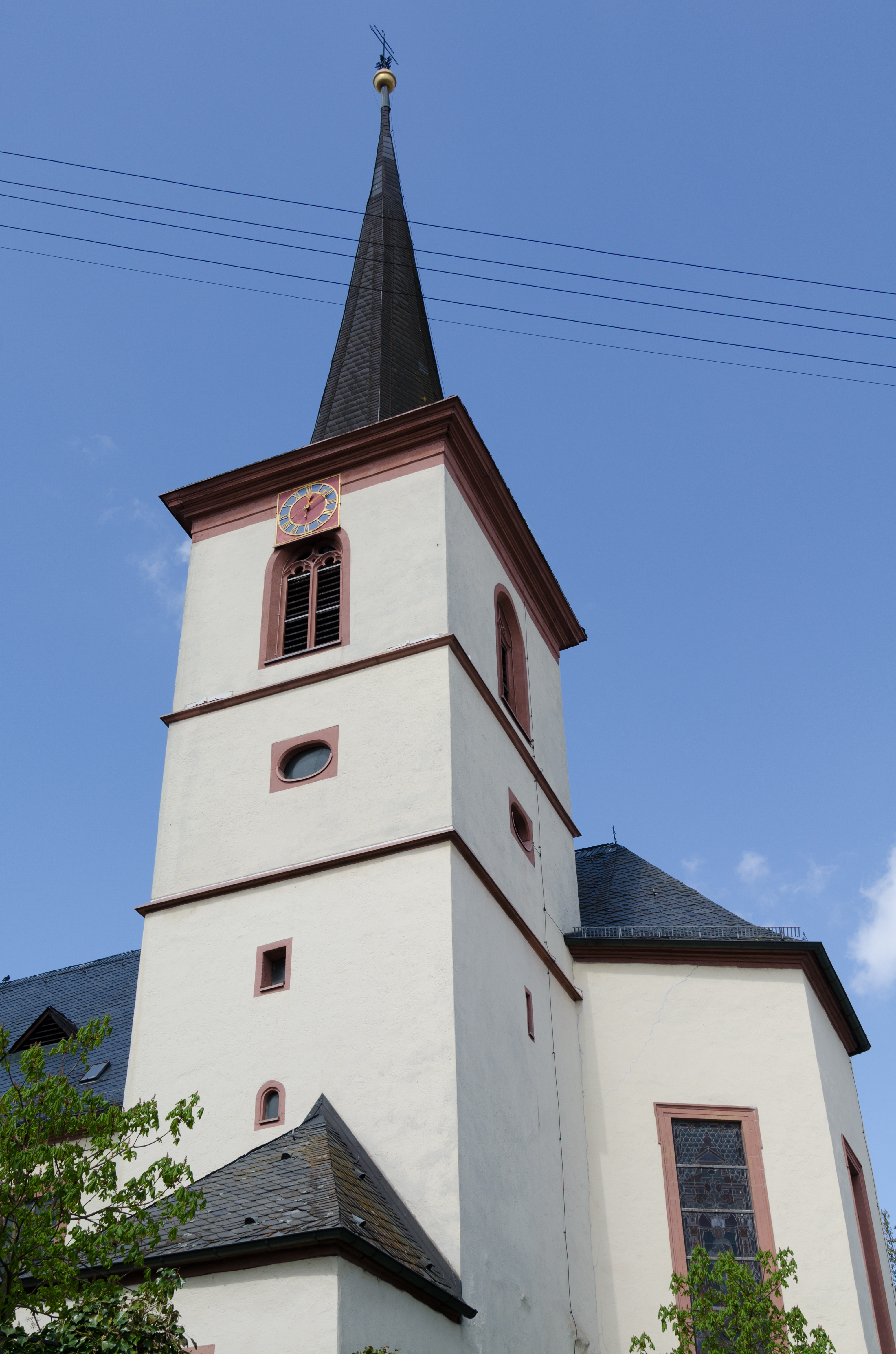 Greußenheim, Kirchplatz 4